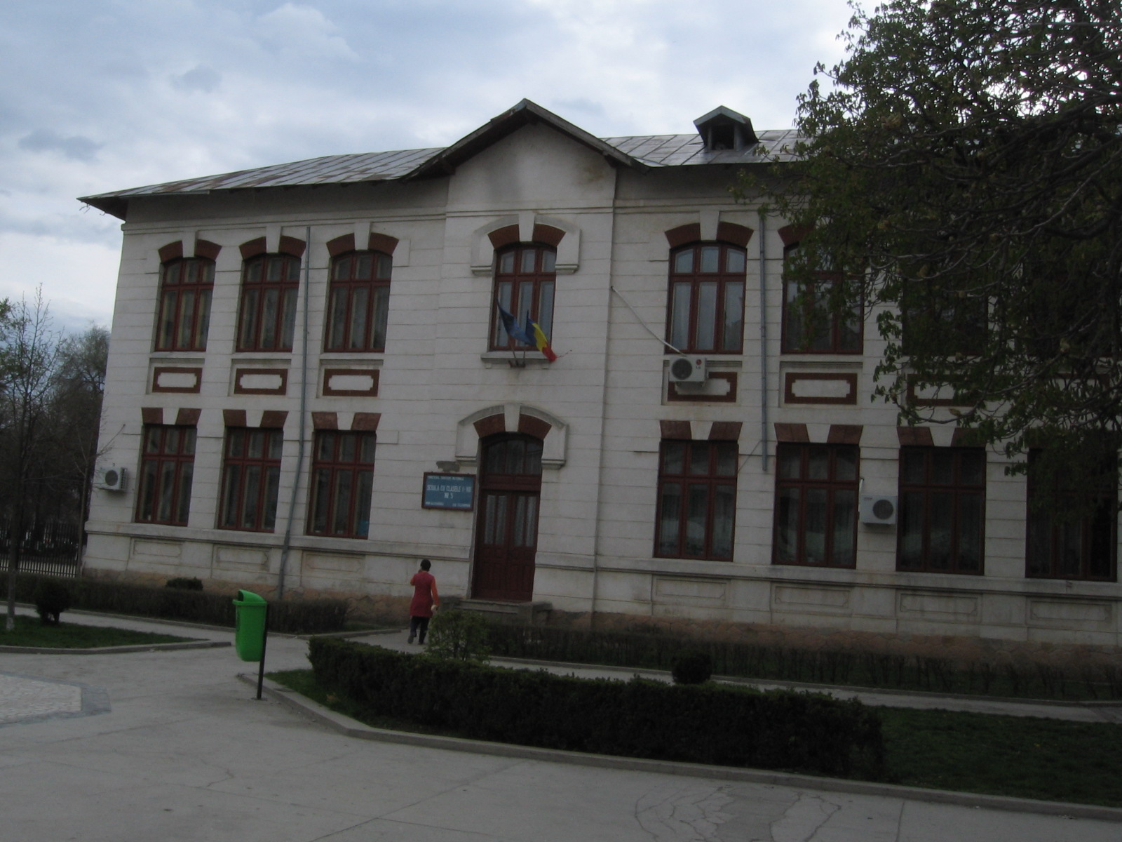 Scoala nr. 5, astazi cea mai veche din Alexandria-Teleorman-RO. A fost construita in 1895.